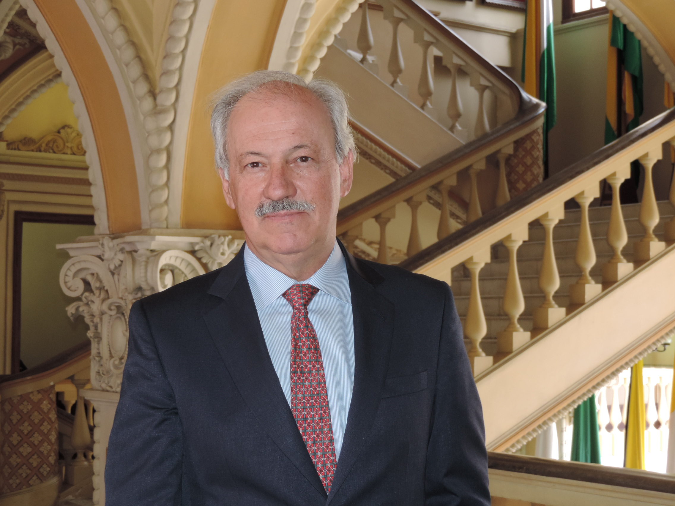 Julian Gutierrez Botero Gobernador